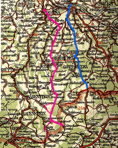 Dresden Teplitzer Poststraßen